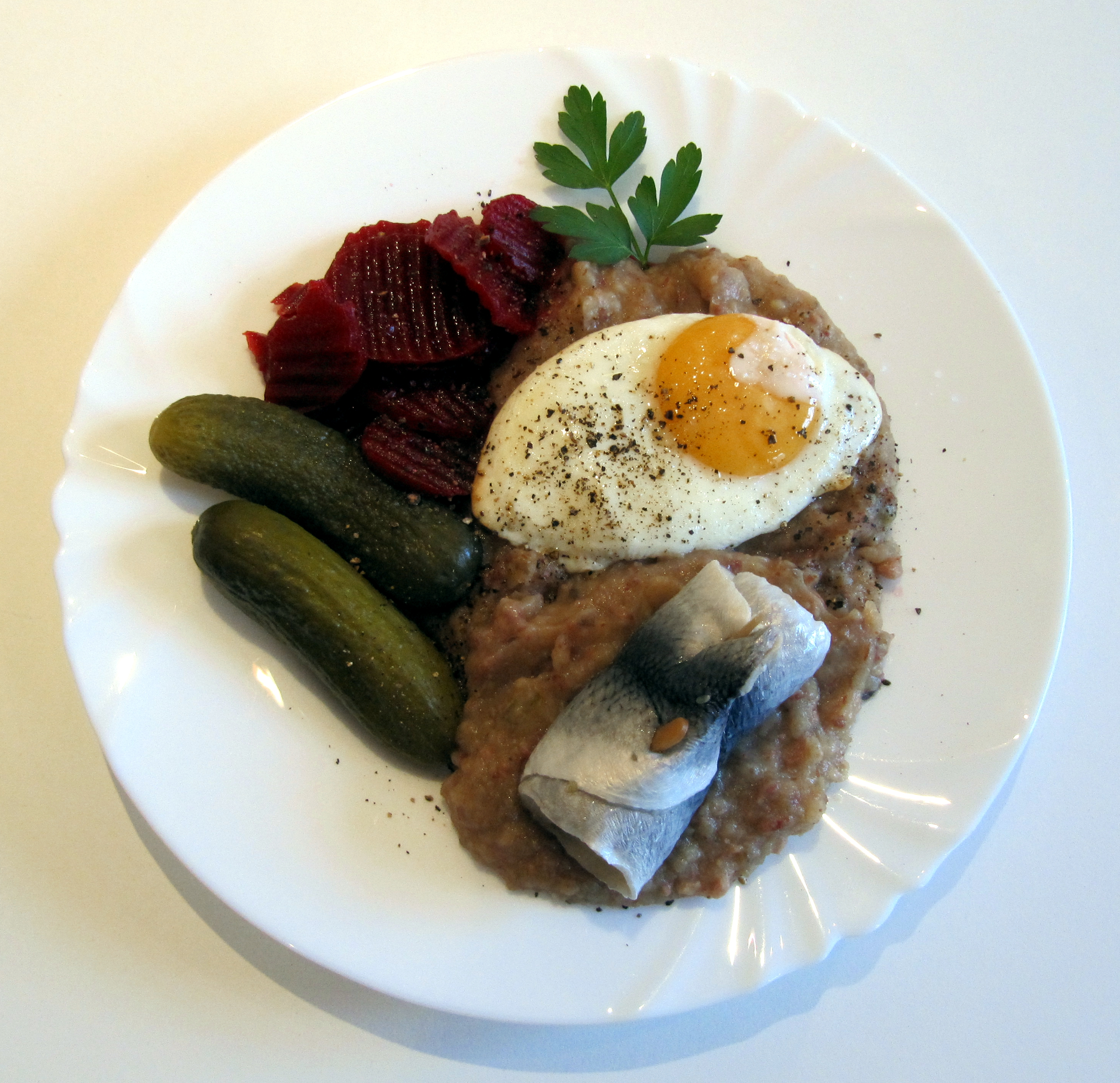 Hamburger Labskaus